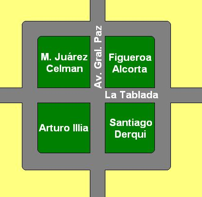 Ubicación de los bustos en la Plaza de los Presidentes Argentinos Cordobeses en Córdoba (Argentina)